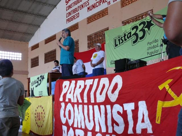 Un acto del PCP.